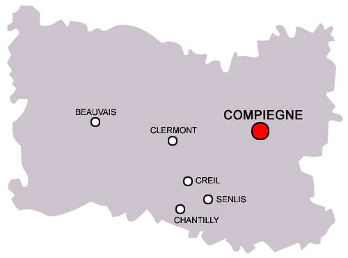 Carte simplifiée indiquant Compiègne (ainsi que d'autres villes importantes de l'Oise) dans l'Oise. La ville de Compiègne est mise en rouge et en plus gros pour indiquer son emplacement.